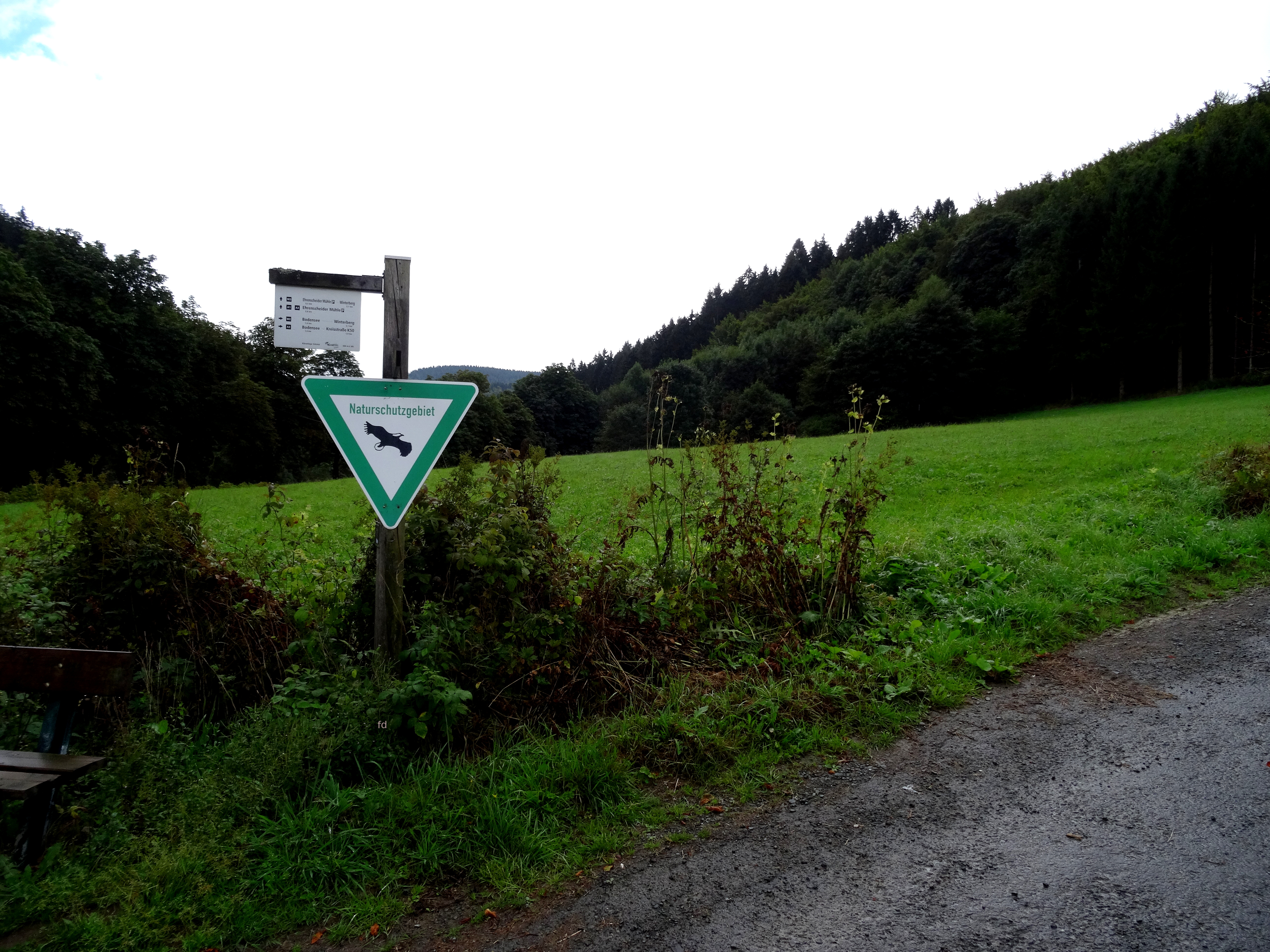 Nordrand Naturschutzgebiet Orketal